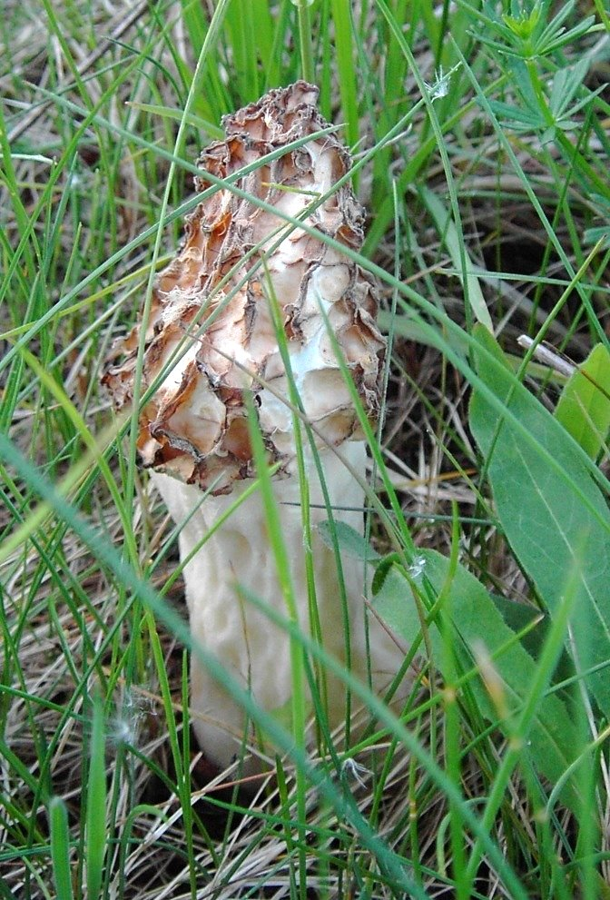 Smardz grubonogiLatina: Morchella crassipes